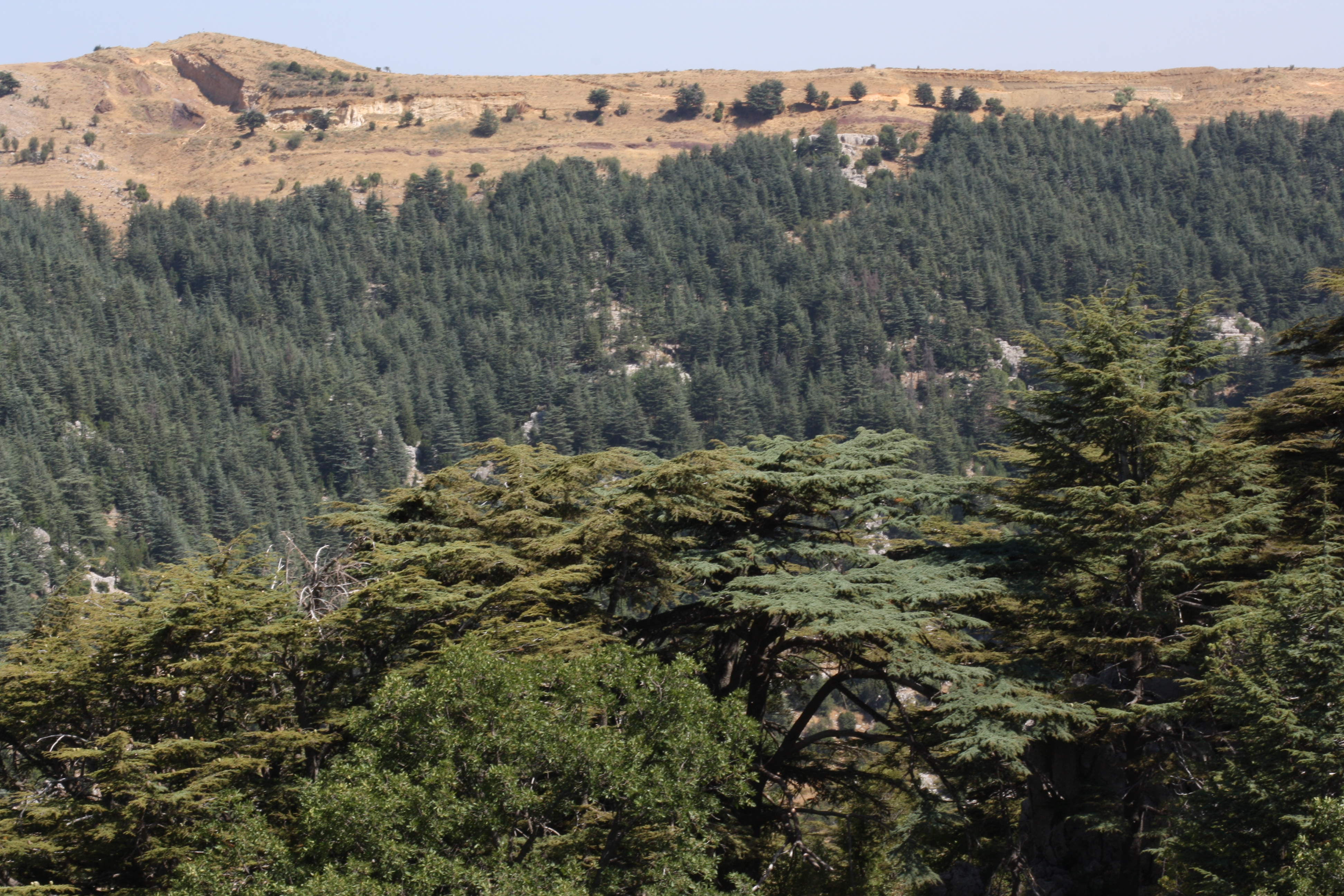 Les cèdres de Tannourine avec la montagne